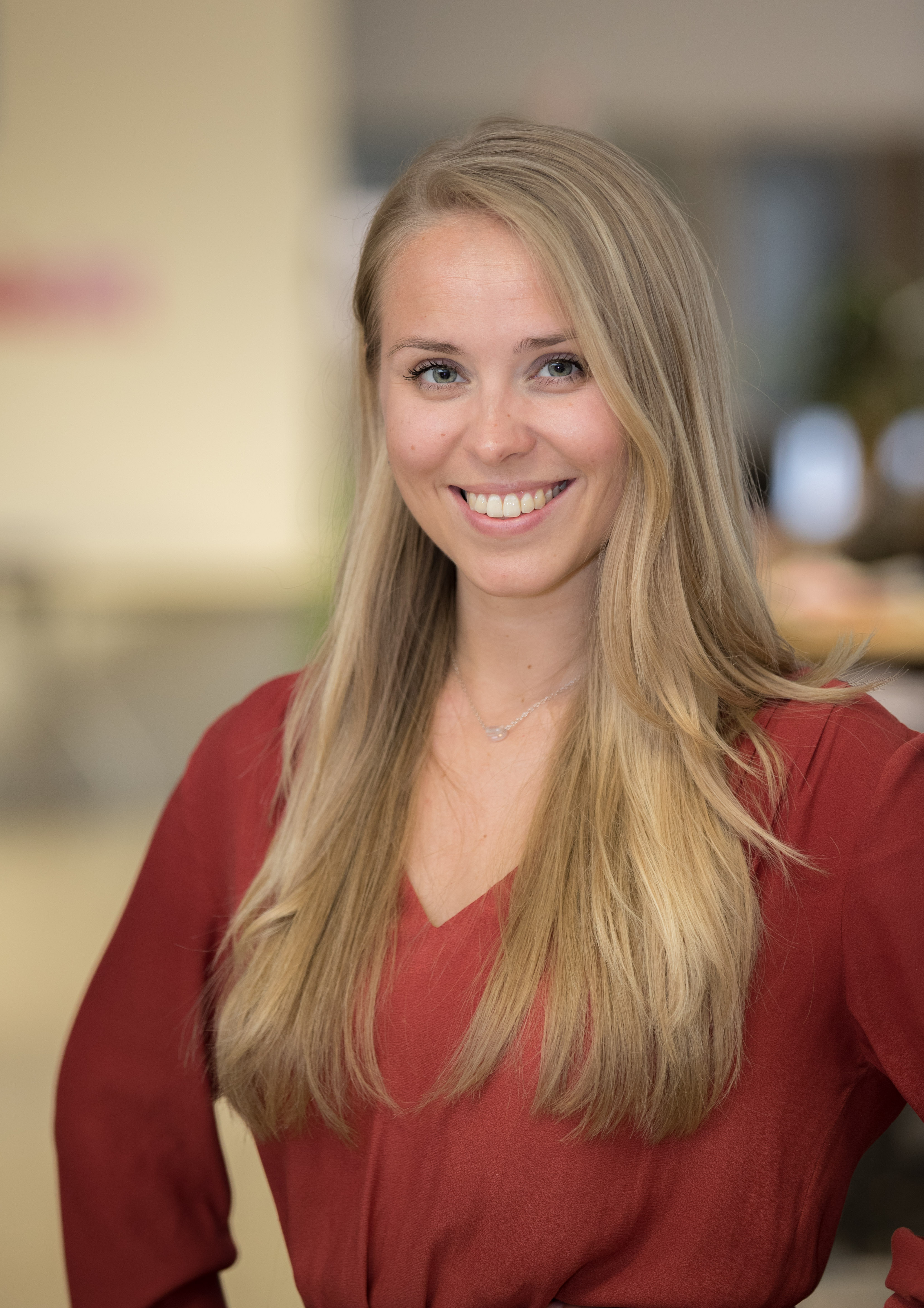 Eliis Pärna